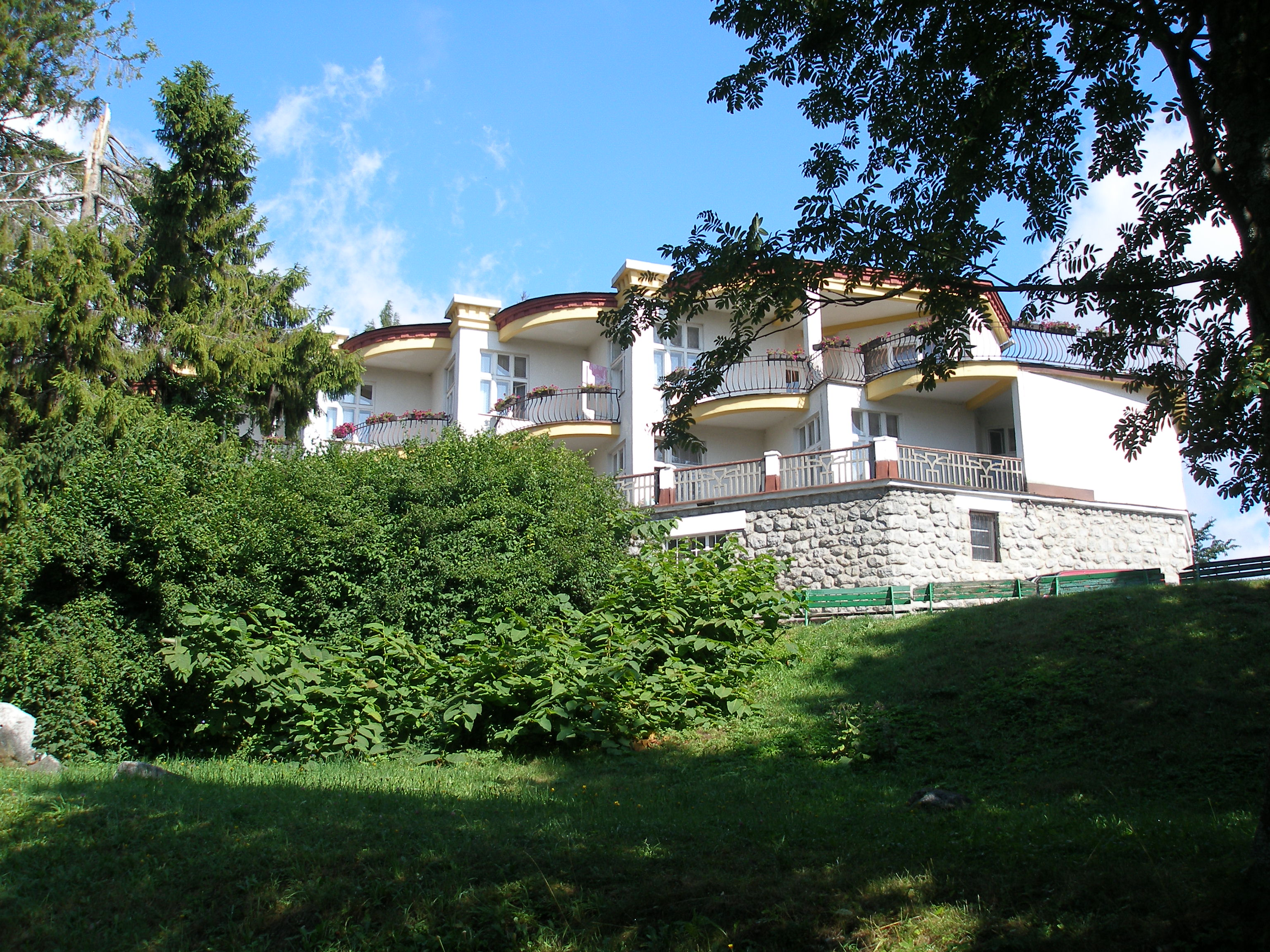 Okolie osady Tatranská Lesná